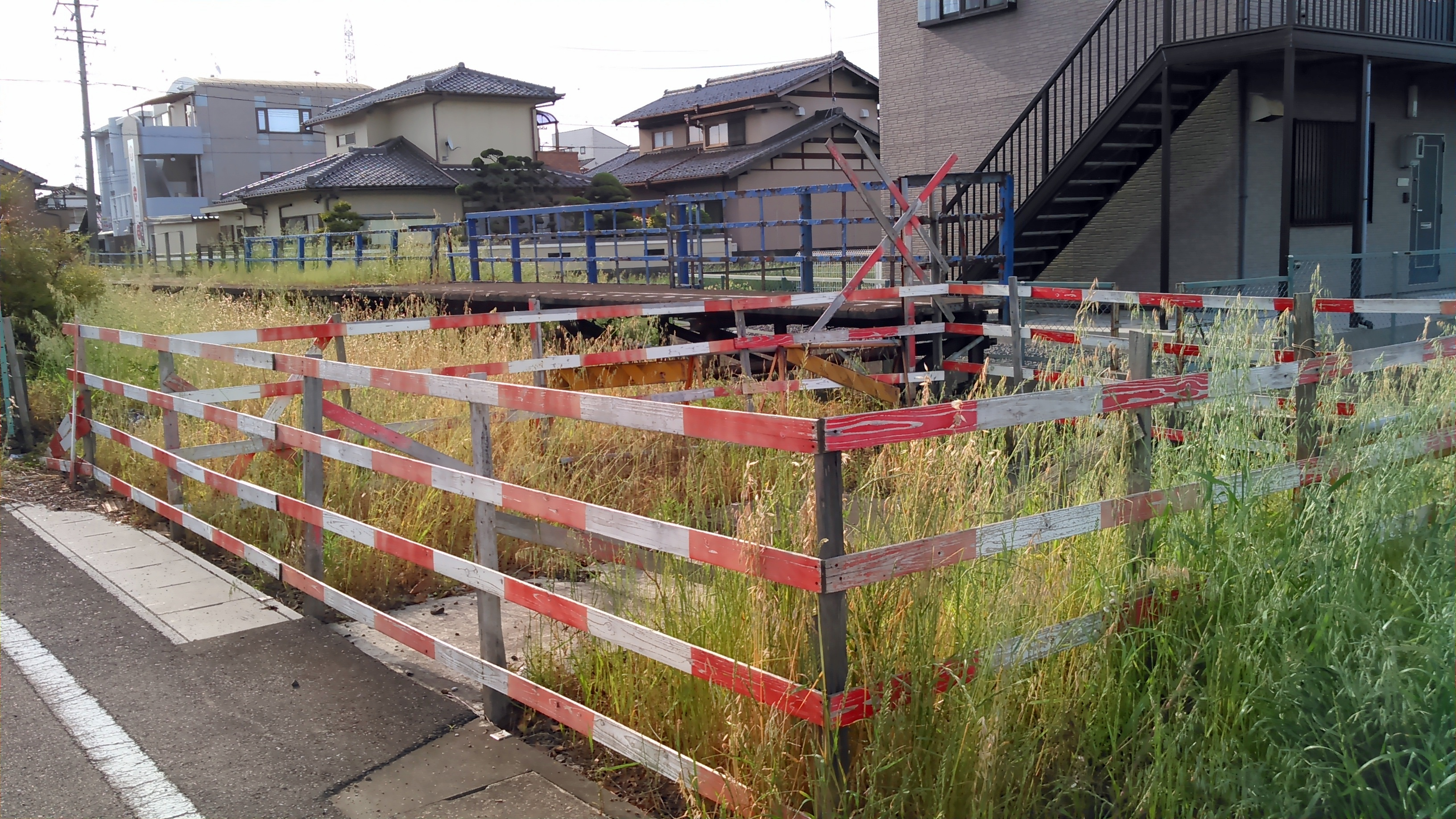 西側から撮影。撮影時点では東側が歩道の道路工事中であったので、不可能だった。